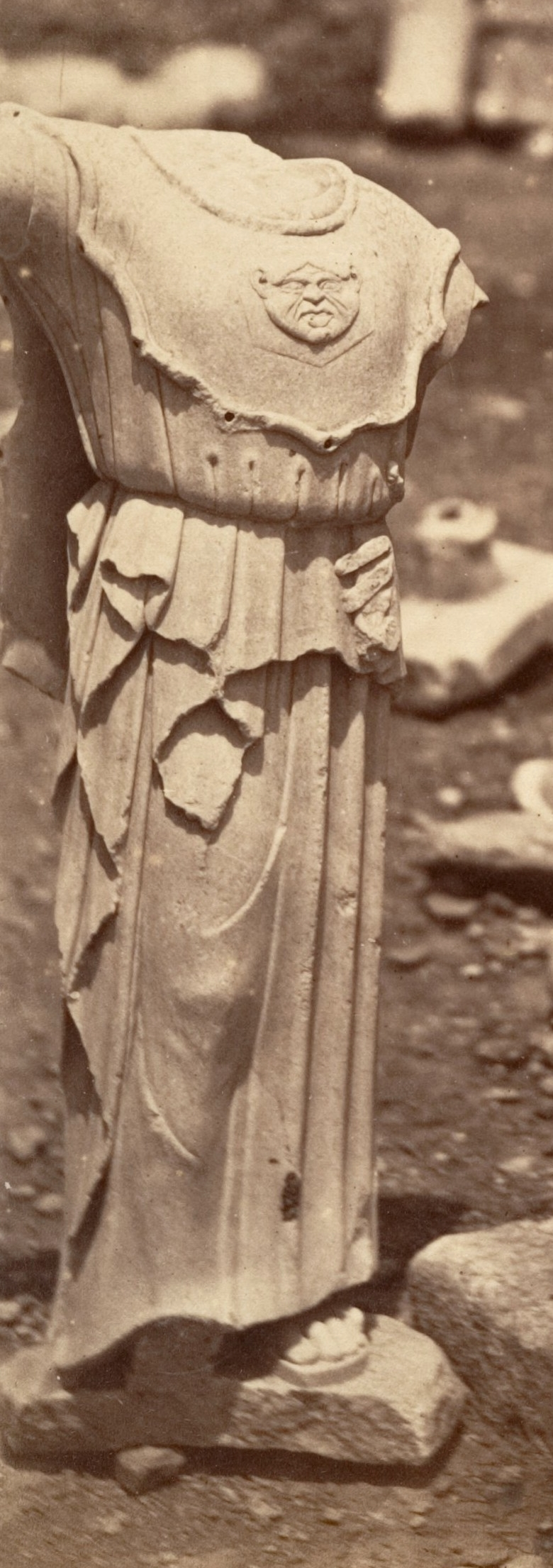 Statue d'Athéna Angélètos, Acropole d'Athènes, 1866.